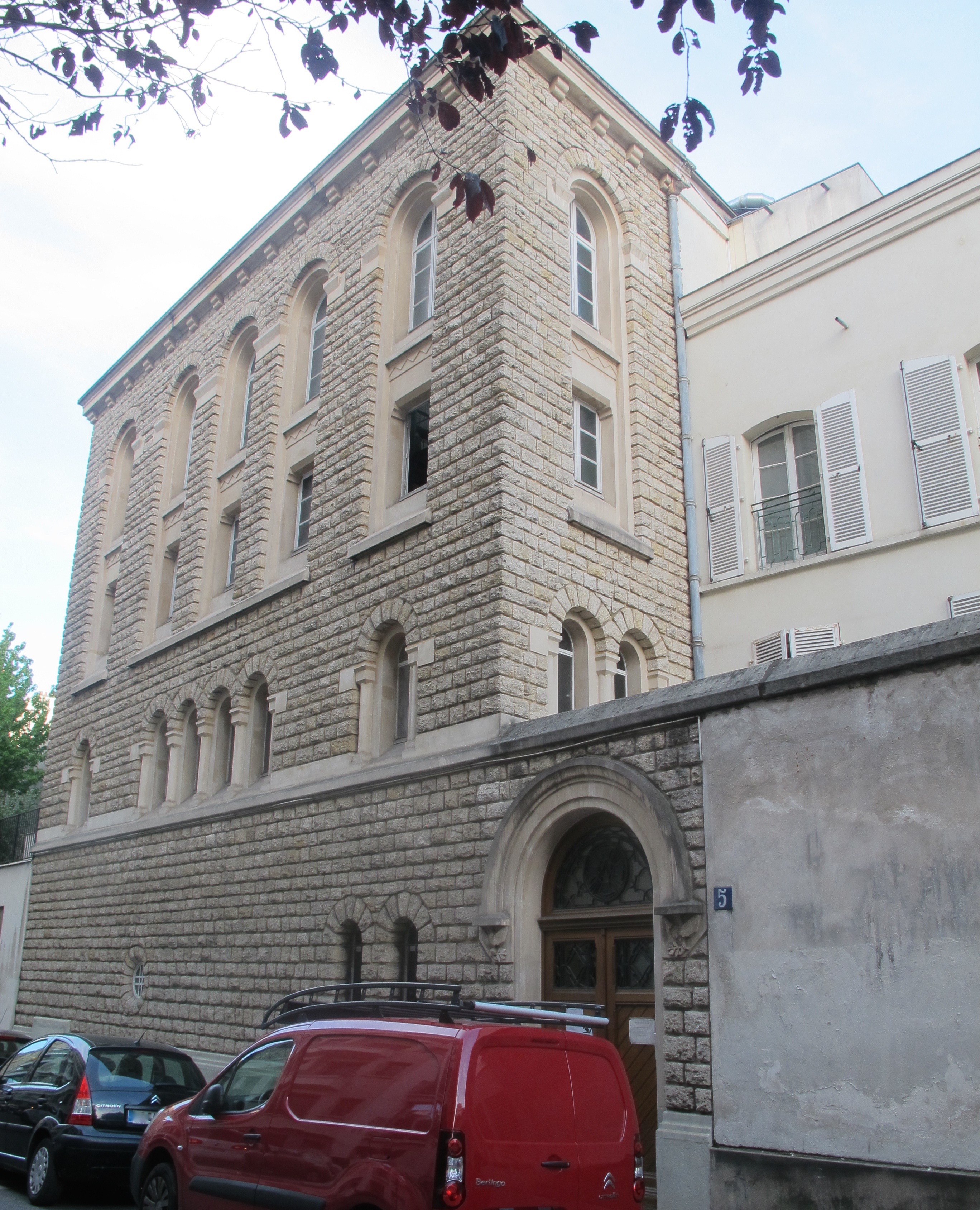 Abbaye Sainte-Marie de Paris, 3 rue de la Source (Paris, 16e).